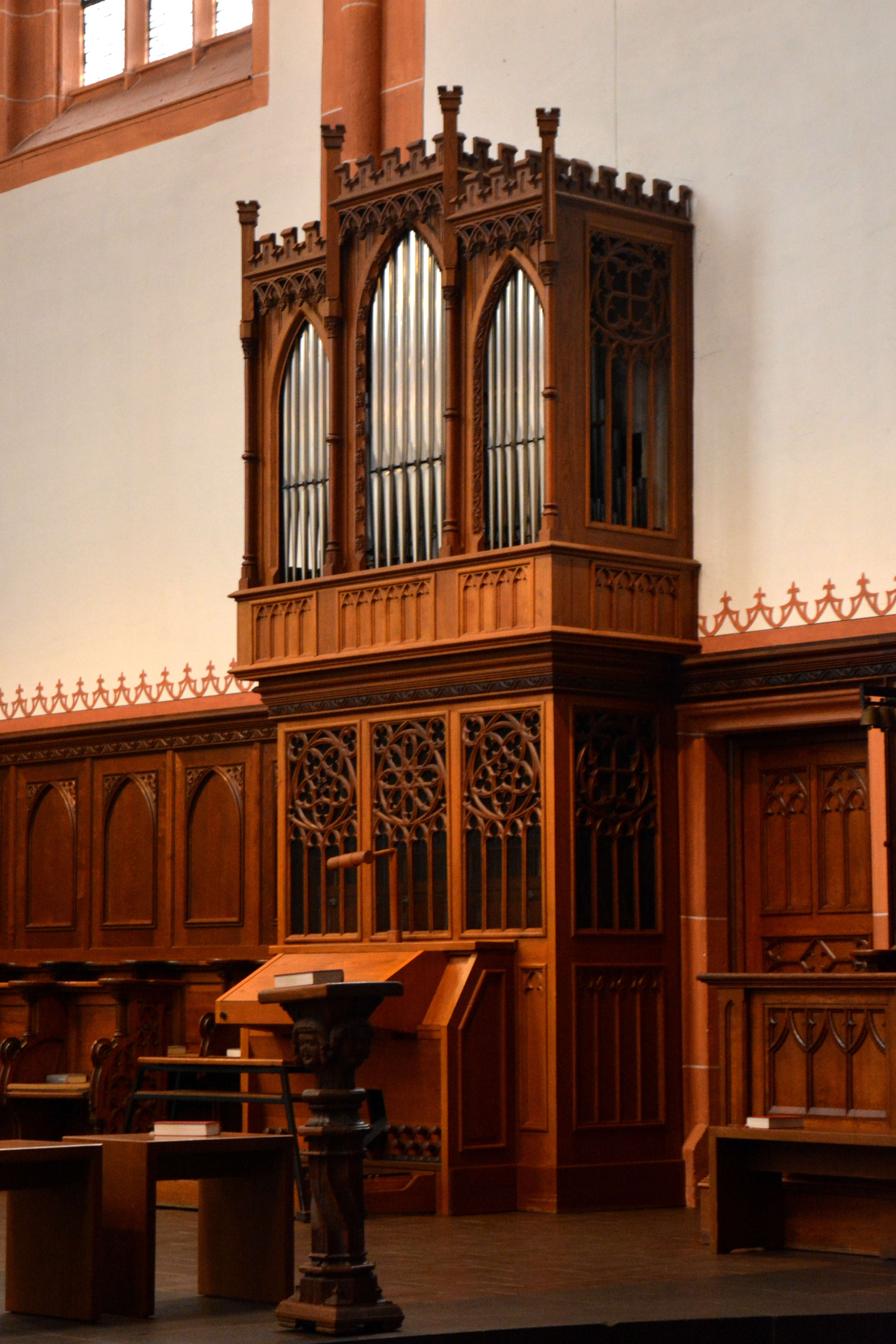 St. Remigius (Borken), Chororgel